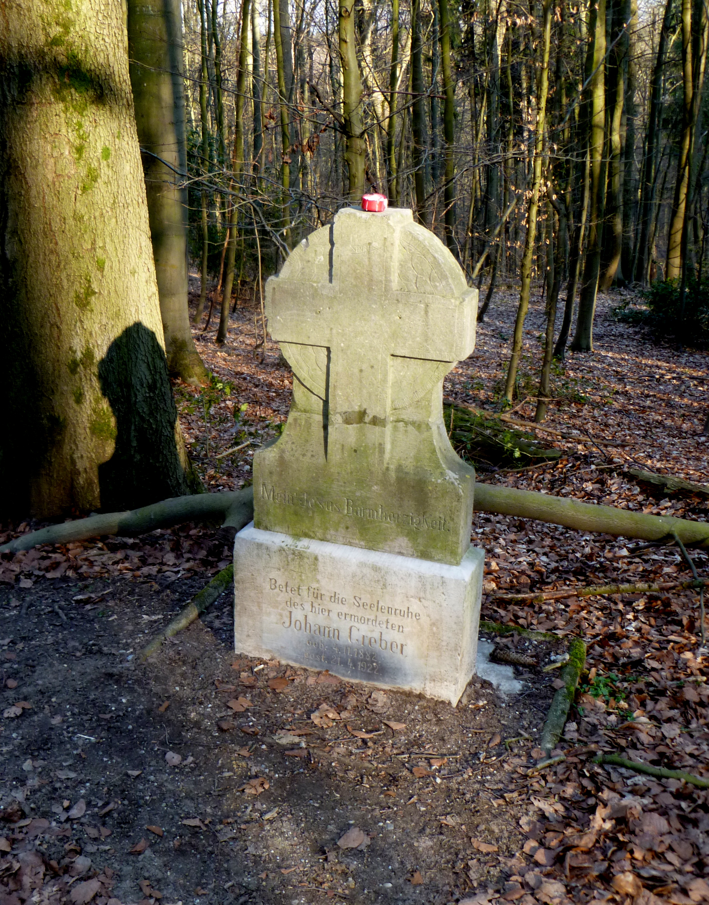 Gedenkstein für Mordopfer Greber im Aachener Wald, Nähe Sieben Wege; Inschrift:"Mein Jesus Barmherzigkeit" - "Betet für die Seele des hier ermordeten Johann Greber. Geb. 4.11.1882 gest. 21.4.1922"